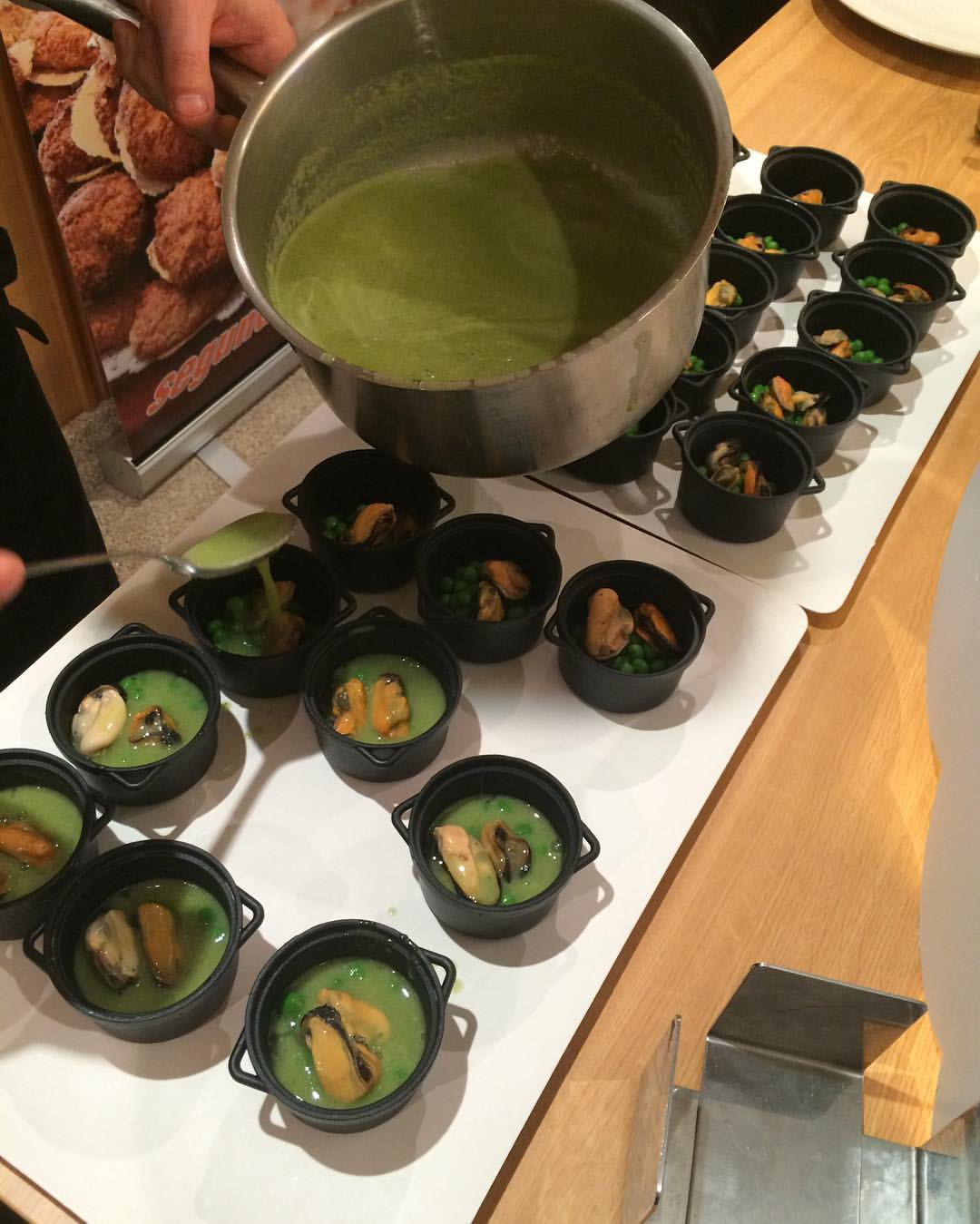 Receita con mexillóns.